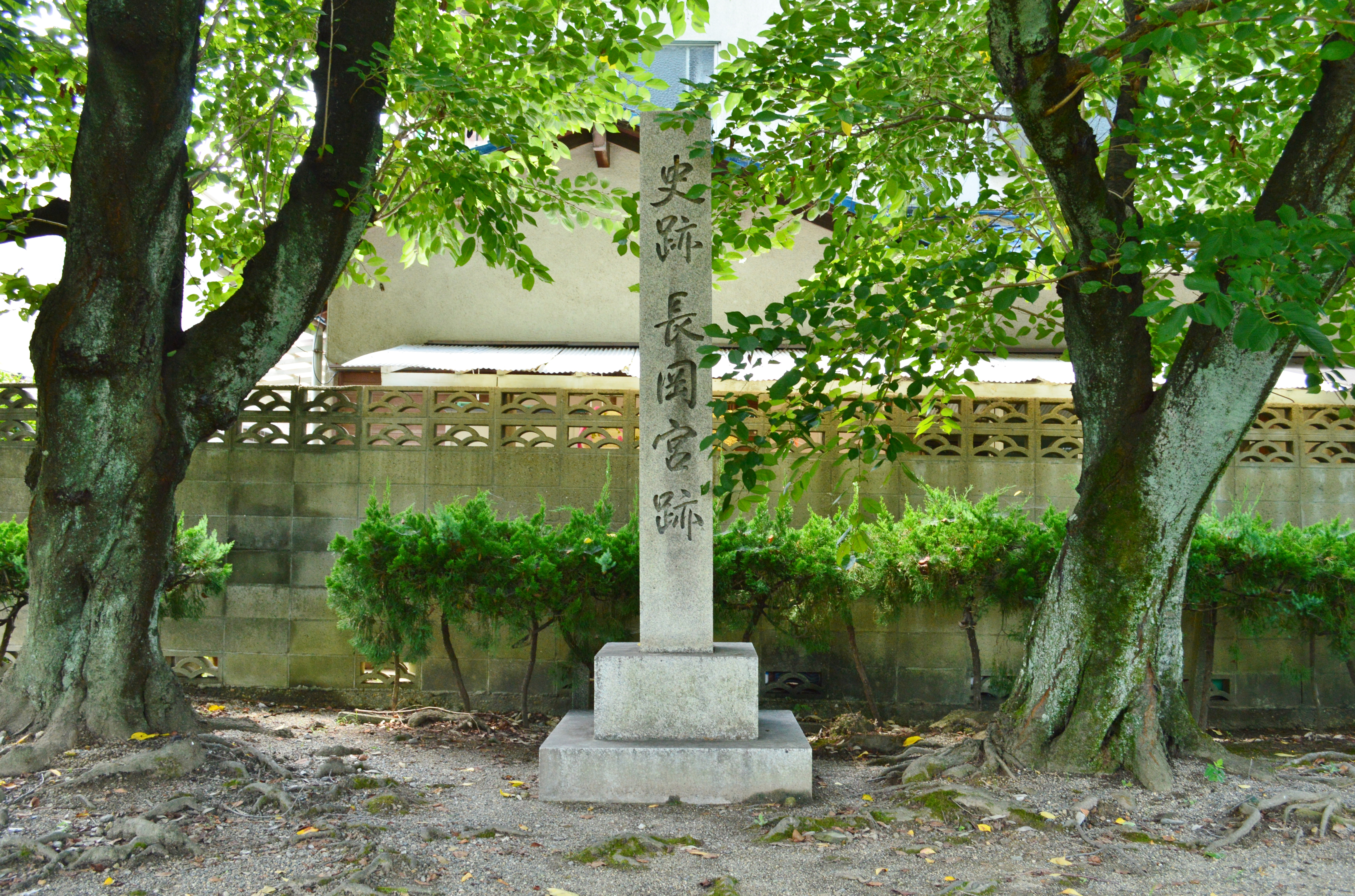 長岡宮跡 石碑